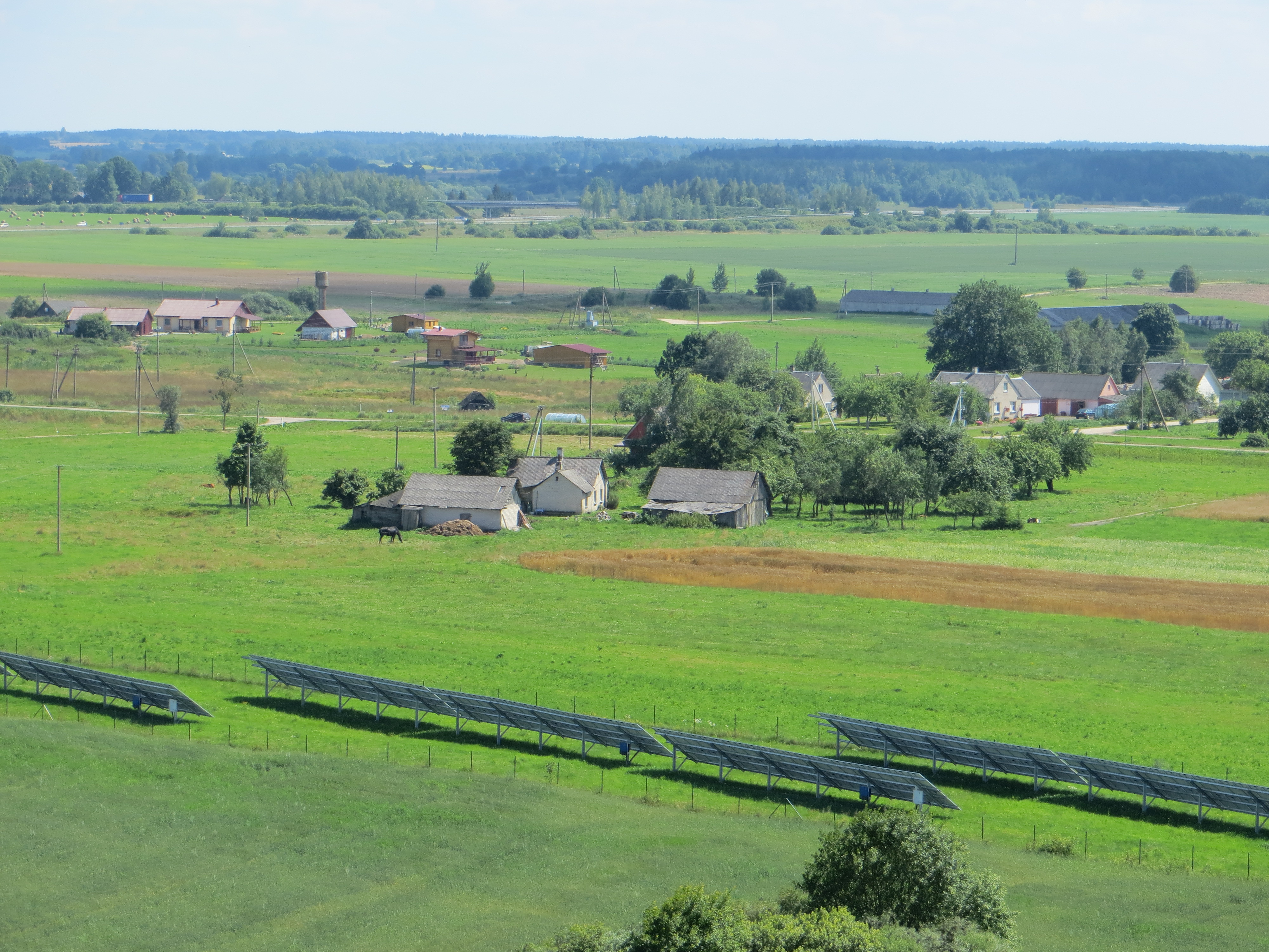 Širvintų sen., Lithuania